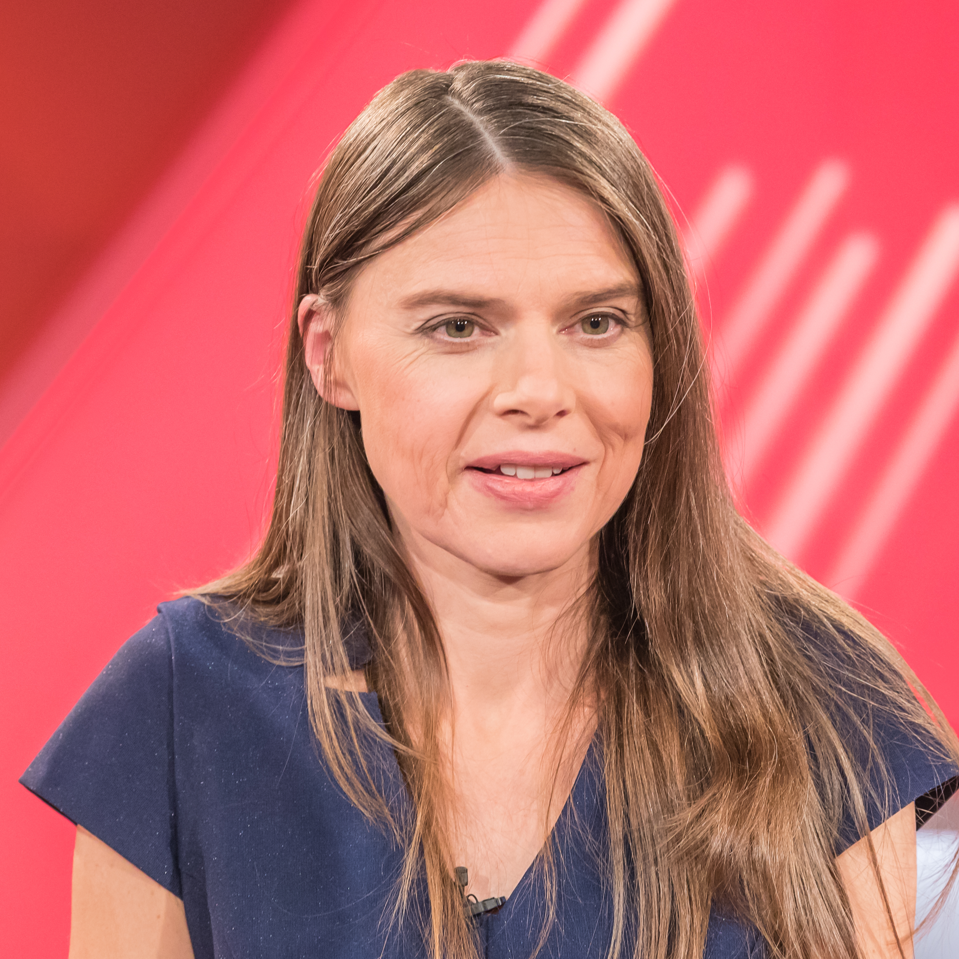 MAISCHBERGER am 26. September 2018 in Köln. Produziert vom WDR. Thema der Sendung: „Missbrauch in der katholischen Kirche: aufklären oder vertuschen?“ Foto: Christiane Florin (Journalistin)